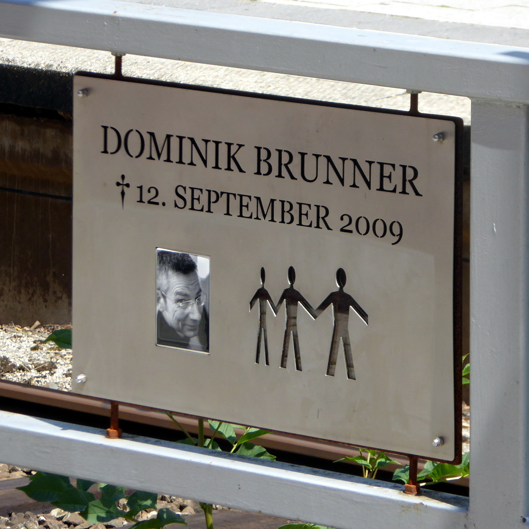 Gedenktafel für Dominik Brunner im Bahnsteiggeländer des Bahnhofs München-Solln.